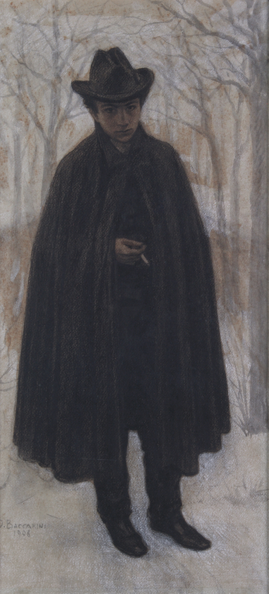 Ritratto di Domenico Rambelli, 1906. Disegno di Domenico Baccarini, firmato e datato, a carboncino e gessetto con sfondo acquarellato, mm. 430 x 195.